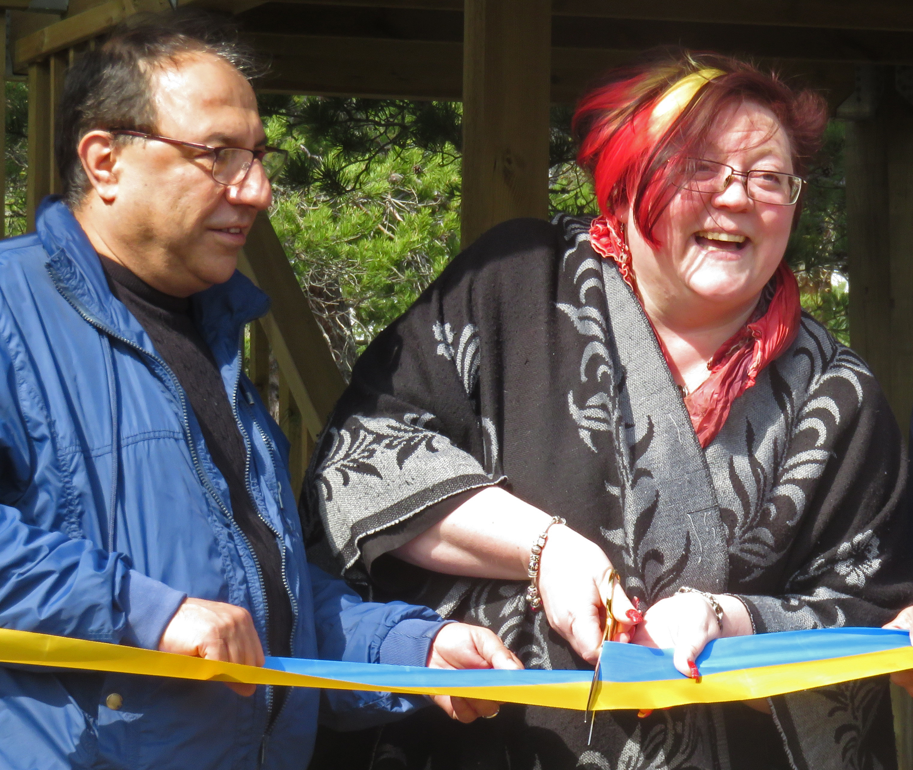 Meeri Wasberg (kommunstyrelsens ordförande) assisterad av Mehmet Coksürer (kultur- och fritidsnämndens ordförande) klipper bandet vid invigningen.